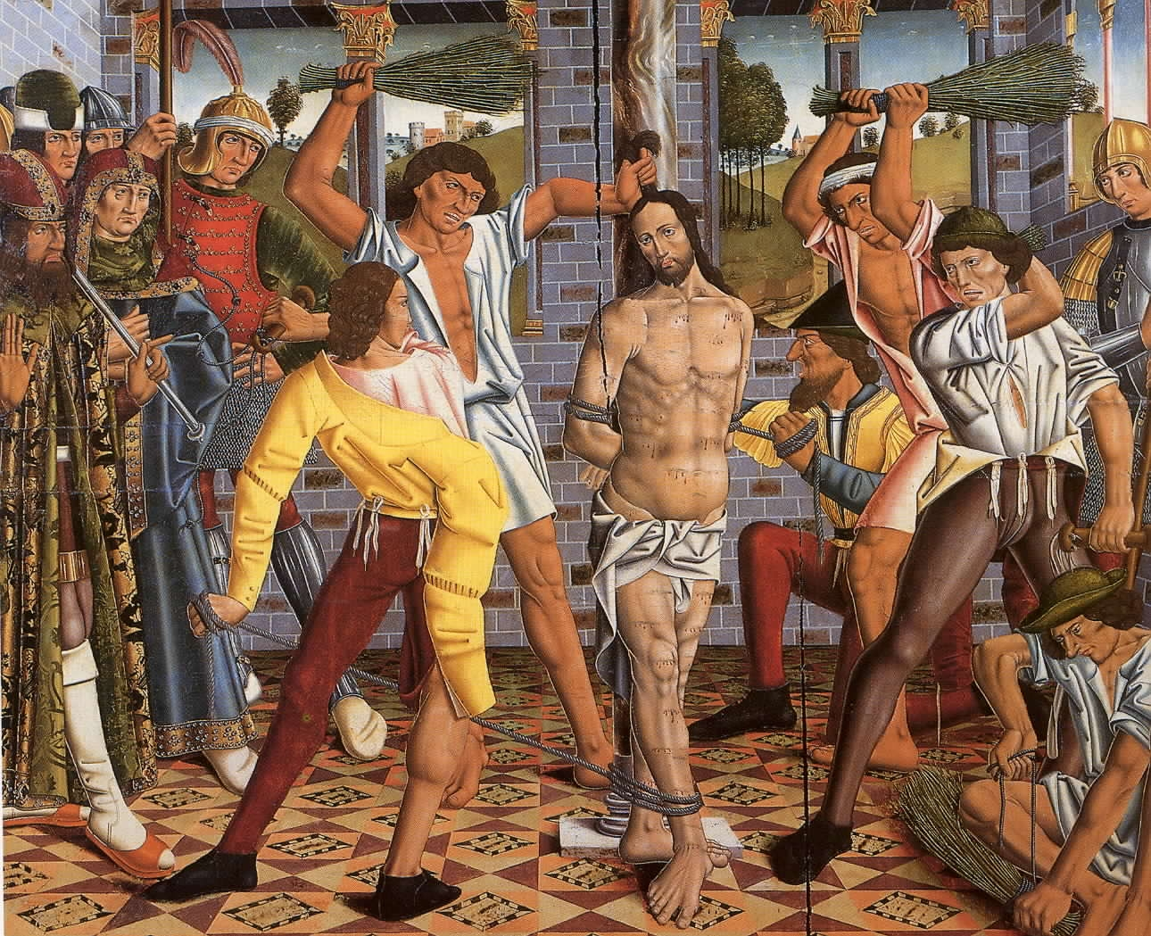 Tabla del armario de las reliquias, reverso de la Anunciación.